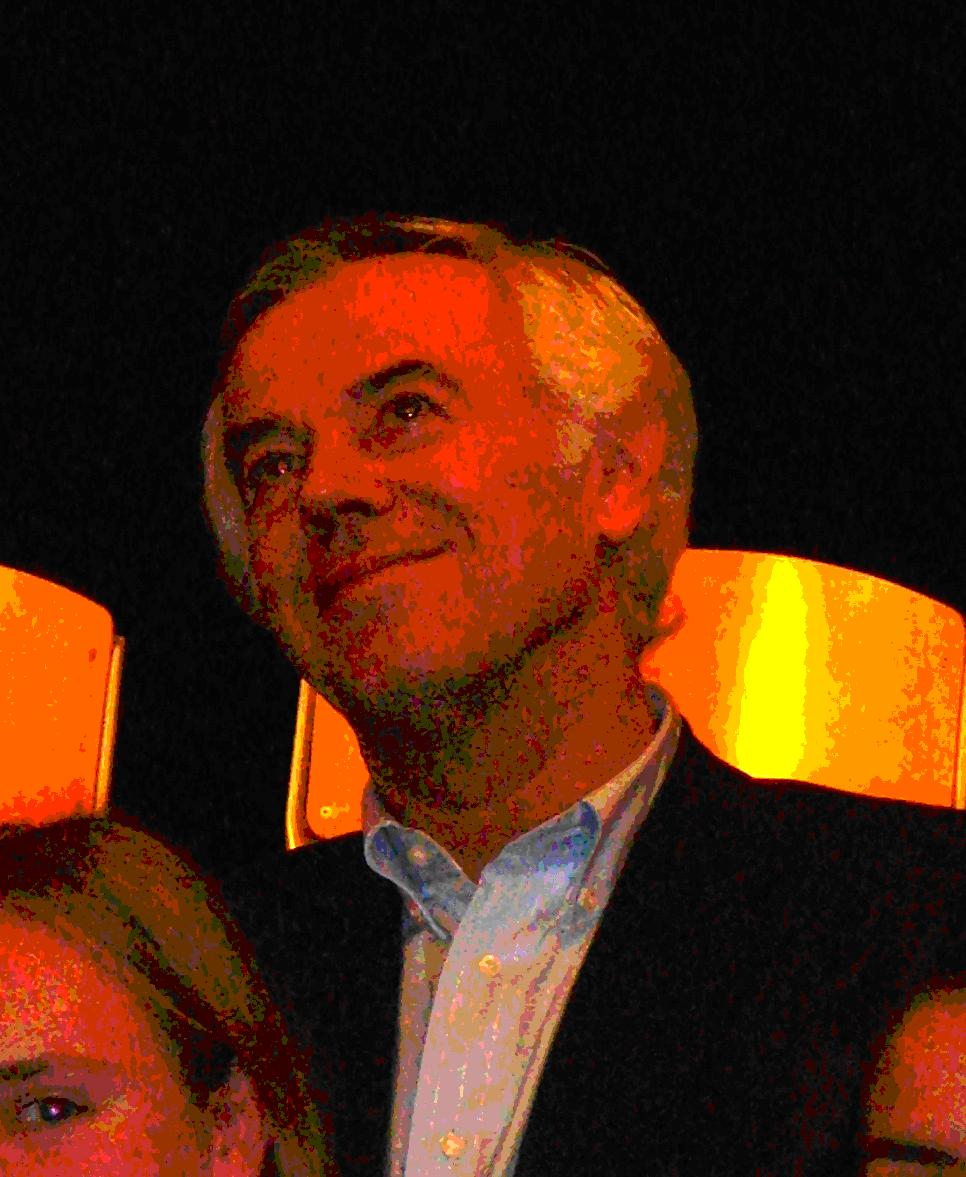 Philippe Grimbert op het Montessori Lyceum, Amsterdam